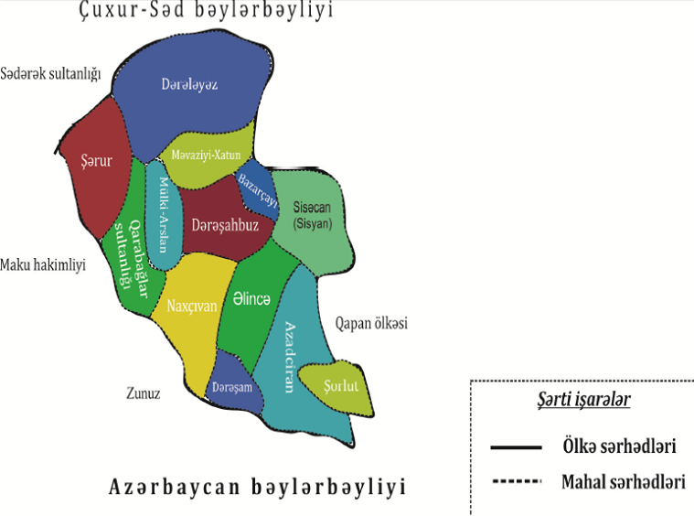 Azərbaycan bəylərbəyliyinin Naxçıvan ölkəsi (XVI-XVII əsrin əvvəlləri). Elnur Kəlbizadənin "Naxçıvanın tarixi-coğrafiyası (XII-XVIII əsrin I yarısı)" kitabından